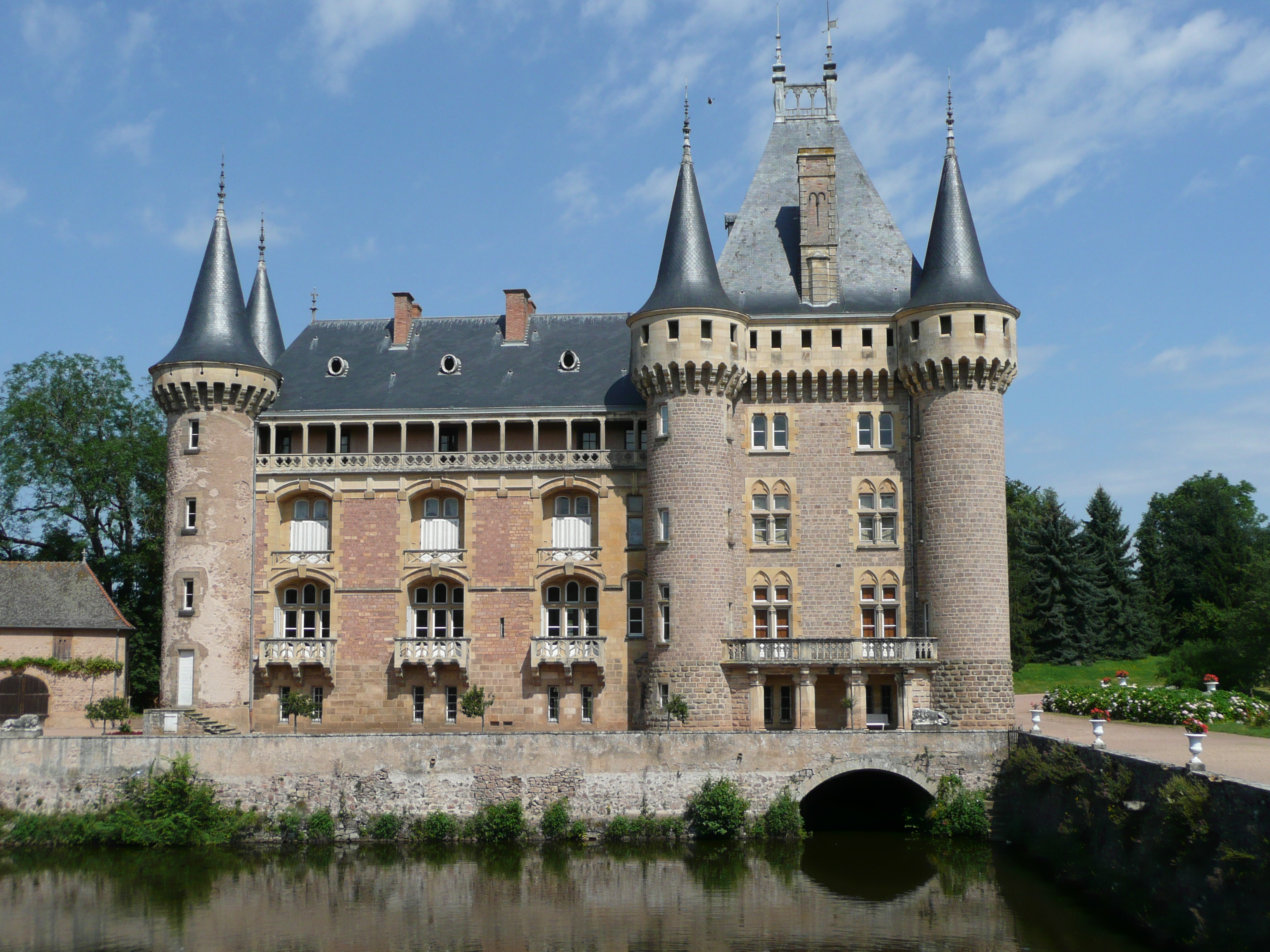 Château de La Clayette en Saône-et-Loire (71), France